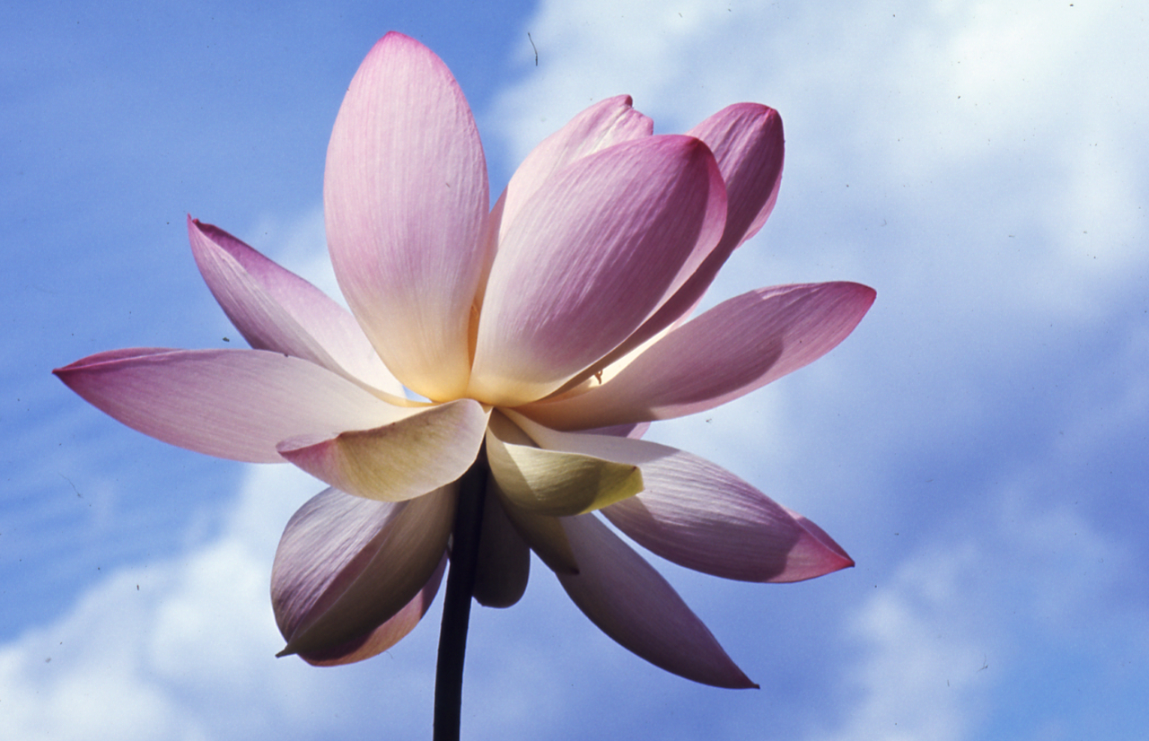 Serie fotografica : Verbania, 1962 / Paolo Monti. - Foglio: 1, Fotogrammi complessivi: 20/20 : Diapositiva, sviluppo cromogeno/ pellicola ; 35 mm. - ((All'interno della scatola contenente i fogli di diapositive nn. 421-435 ritaglio di stampa fotografica con iscrizione manoscritta a pennarello nero sul verso: "Villa/ Taranto/ Fiori di Loto" e a penna rossa: "Autunno". - Fonte: Rubrica di Paolo Monti: Diapositive 24x36mm (1948-1982), presso Archivio Paolo Monti. Rubrica con elenco soggetti e numeri di inventario (da 1 a 1000) corrispondenti ai fogli a tasche in pvc in cui sono contenute le diapositive.